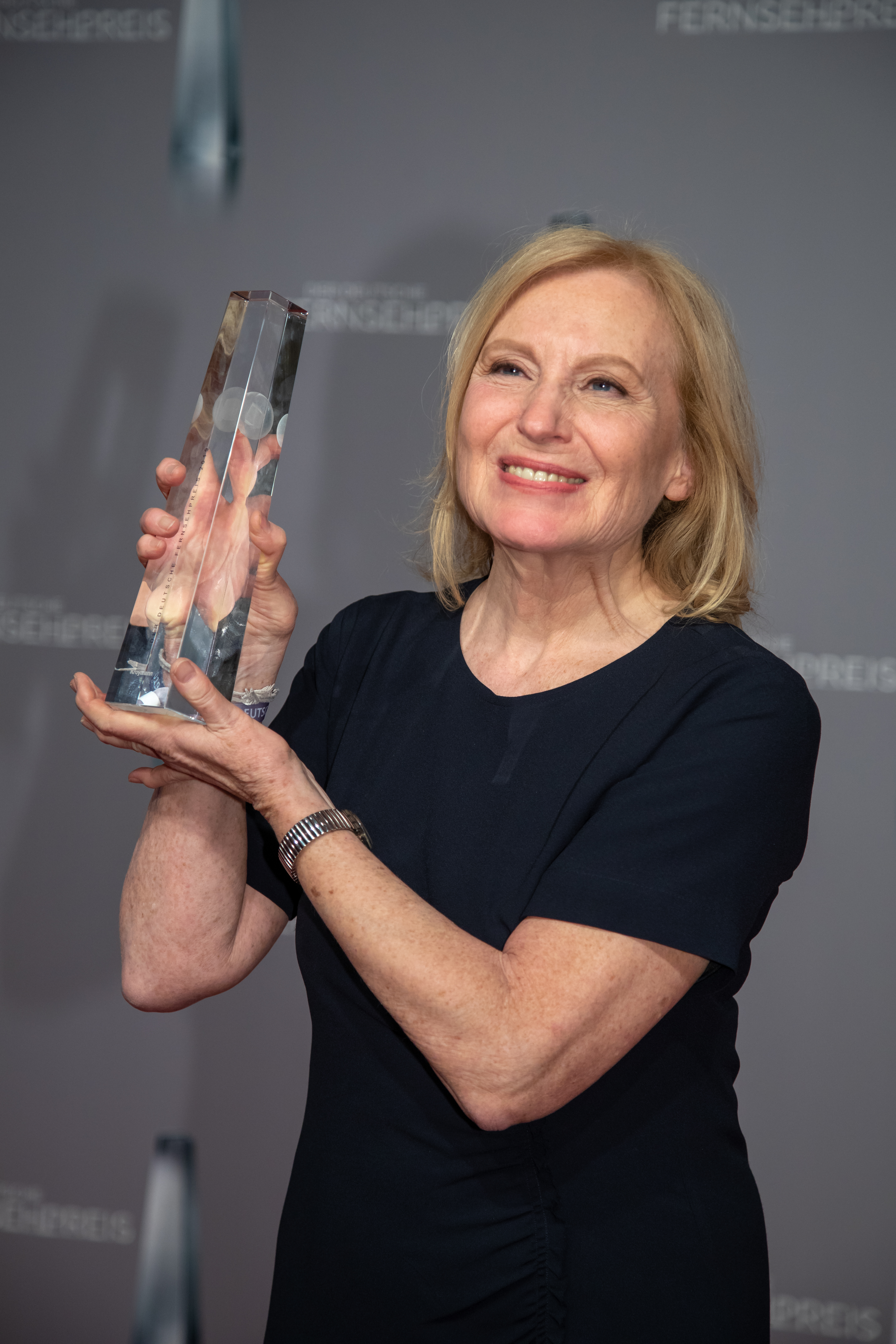 Maren Kroymann beim Deutschen Fernsehpreis 2019 in der Düsseldorfer Rheinterrasse